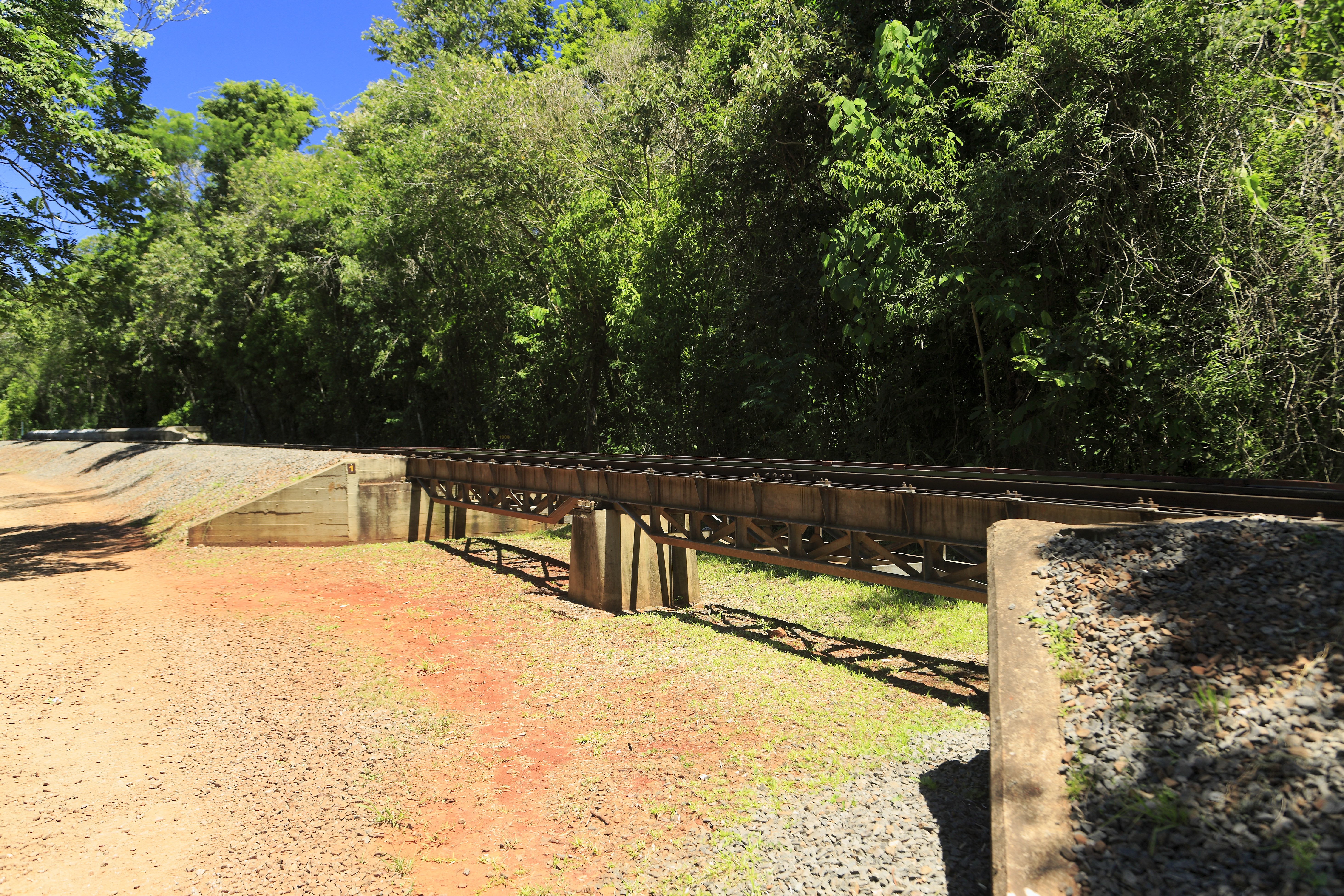 Die Strecke bis zum Endpunkt Garganta del Diablo entlang dem Oberwasser des Río Iguazú führt wegen der Hochwassergefahr praktisch durchgehend auf einem Damm. Zur Entlastung und damit dieser nicht wie ein Stau wirkt, ist er mit 13 Flutbrücken unterbrochen.Im Hintergrund liegt ein im Regelfall nicht genutzter Bahnsteig.